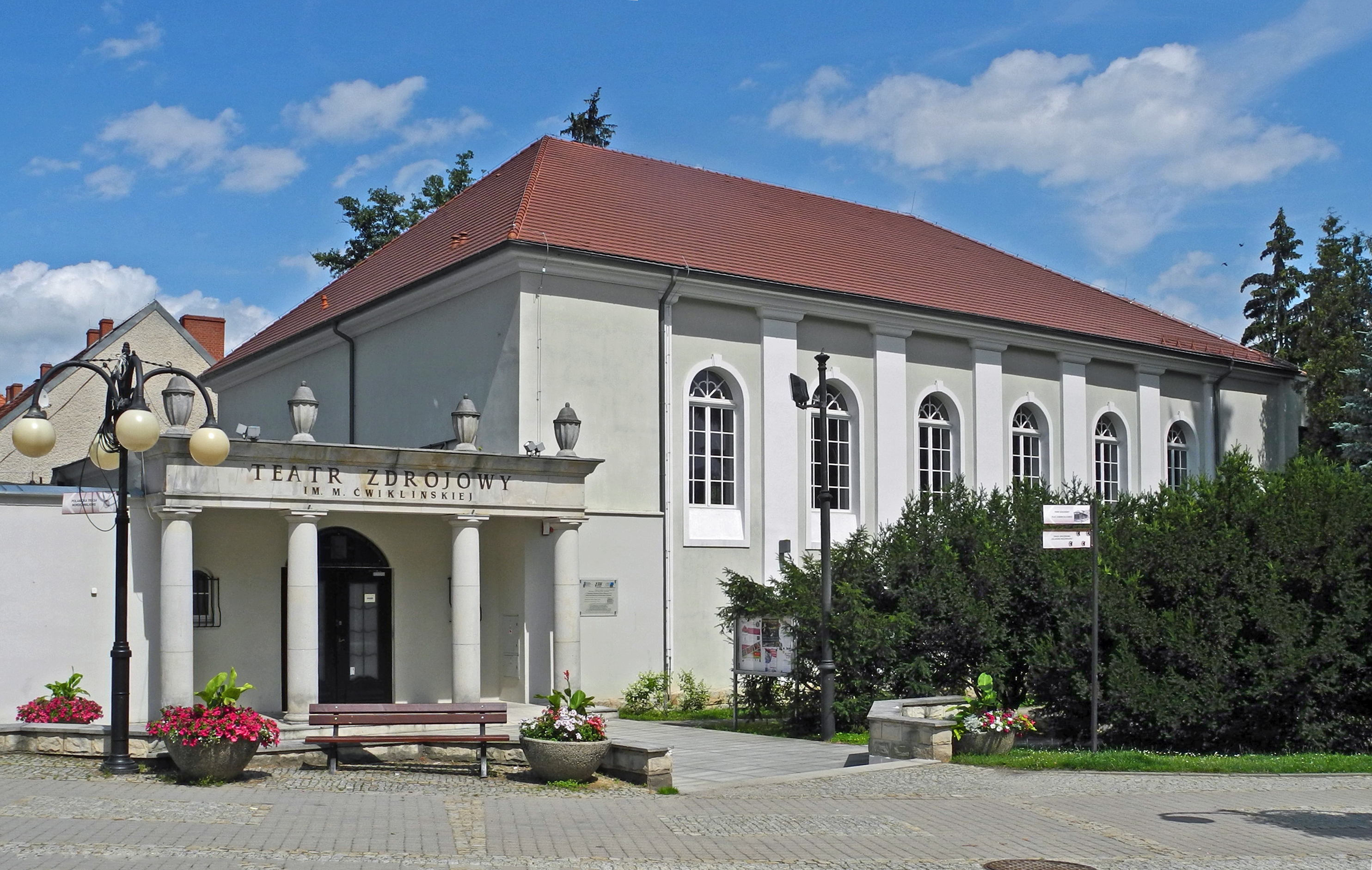 Kurtheater in Bad Altheide (Polanica Zdrój) in Niederschlesien